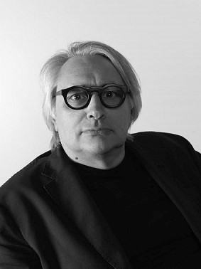 Claudio Lucchin architetto